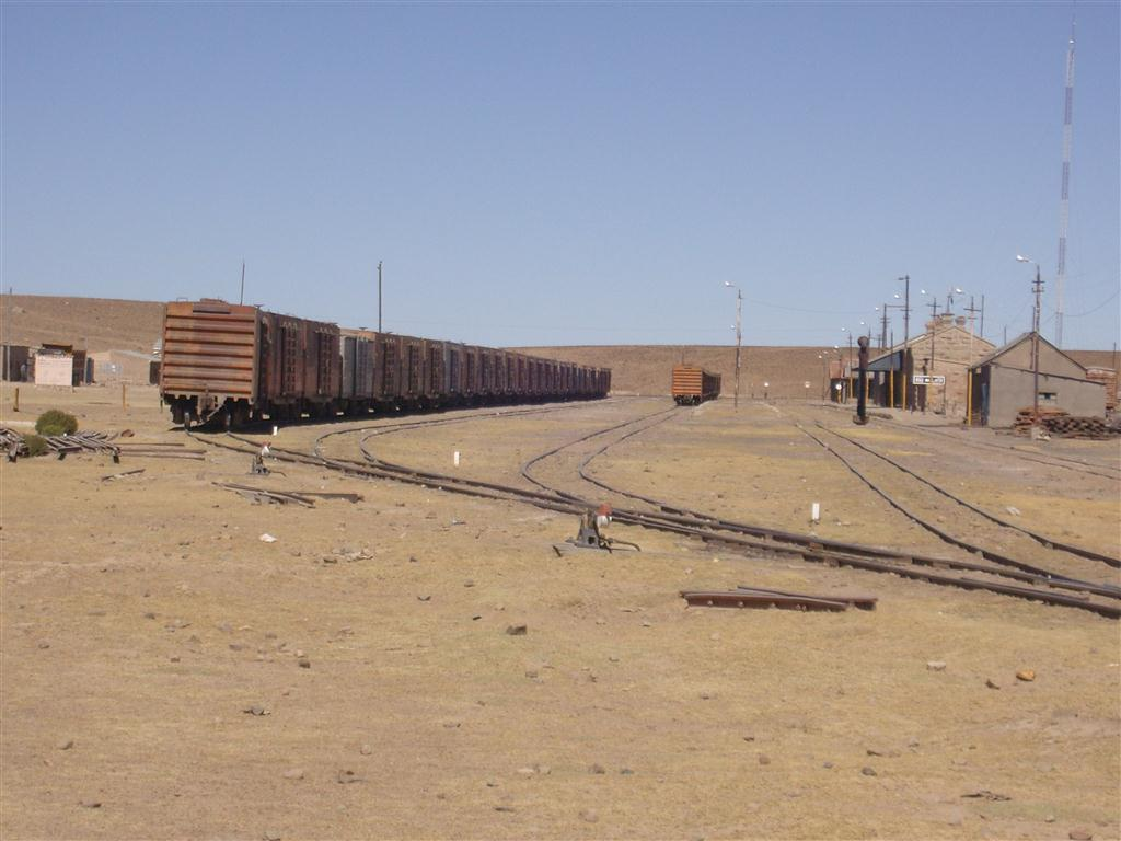 Estación de Ferrocarril Río Mulato, Potosí - Bolivia